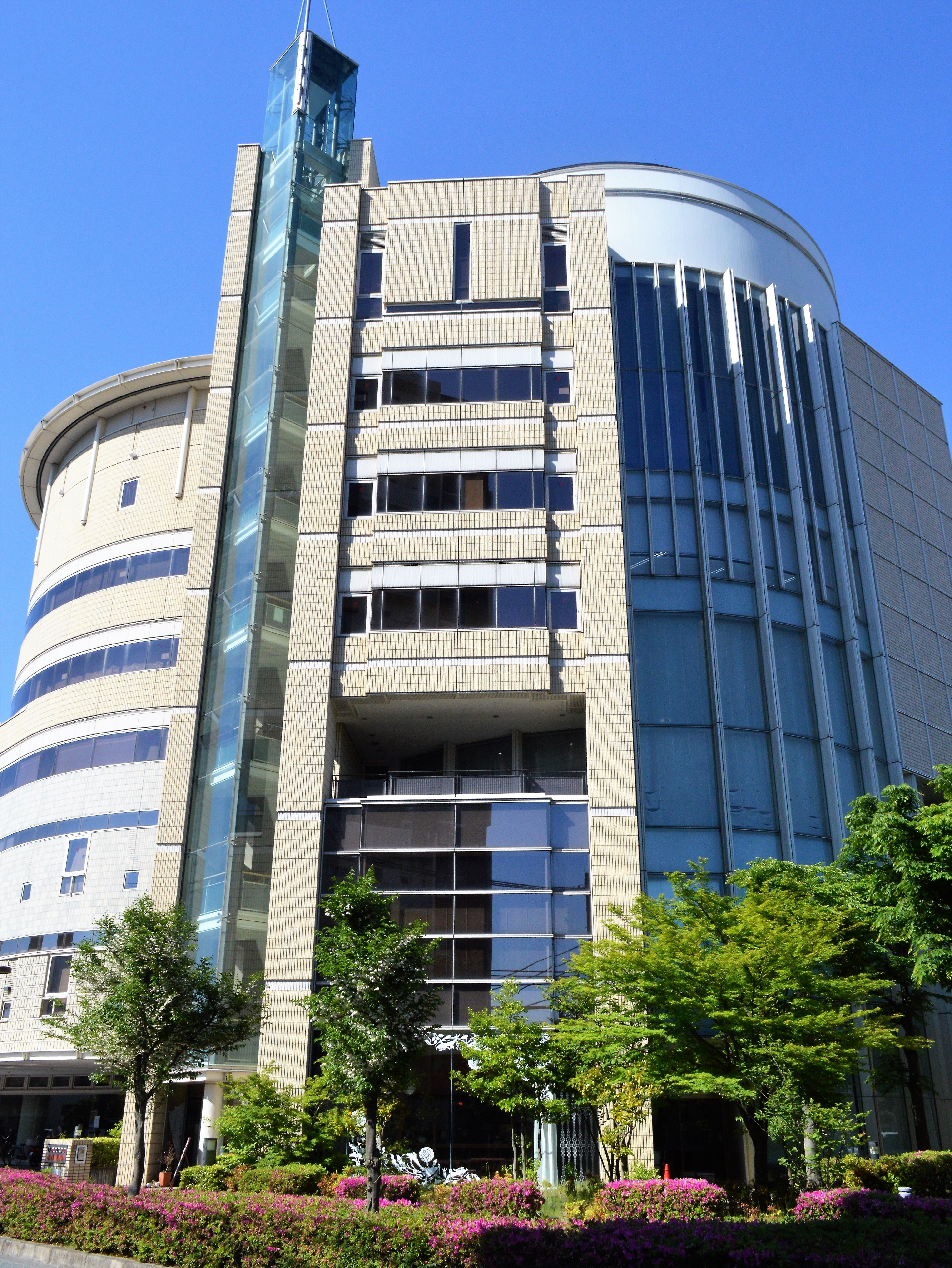 岐阜県多治見市のまなびパークたじみ。多治見市図書館などが入っている。